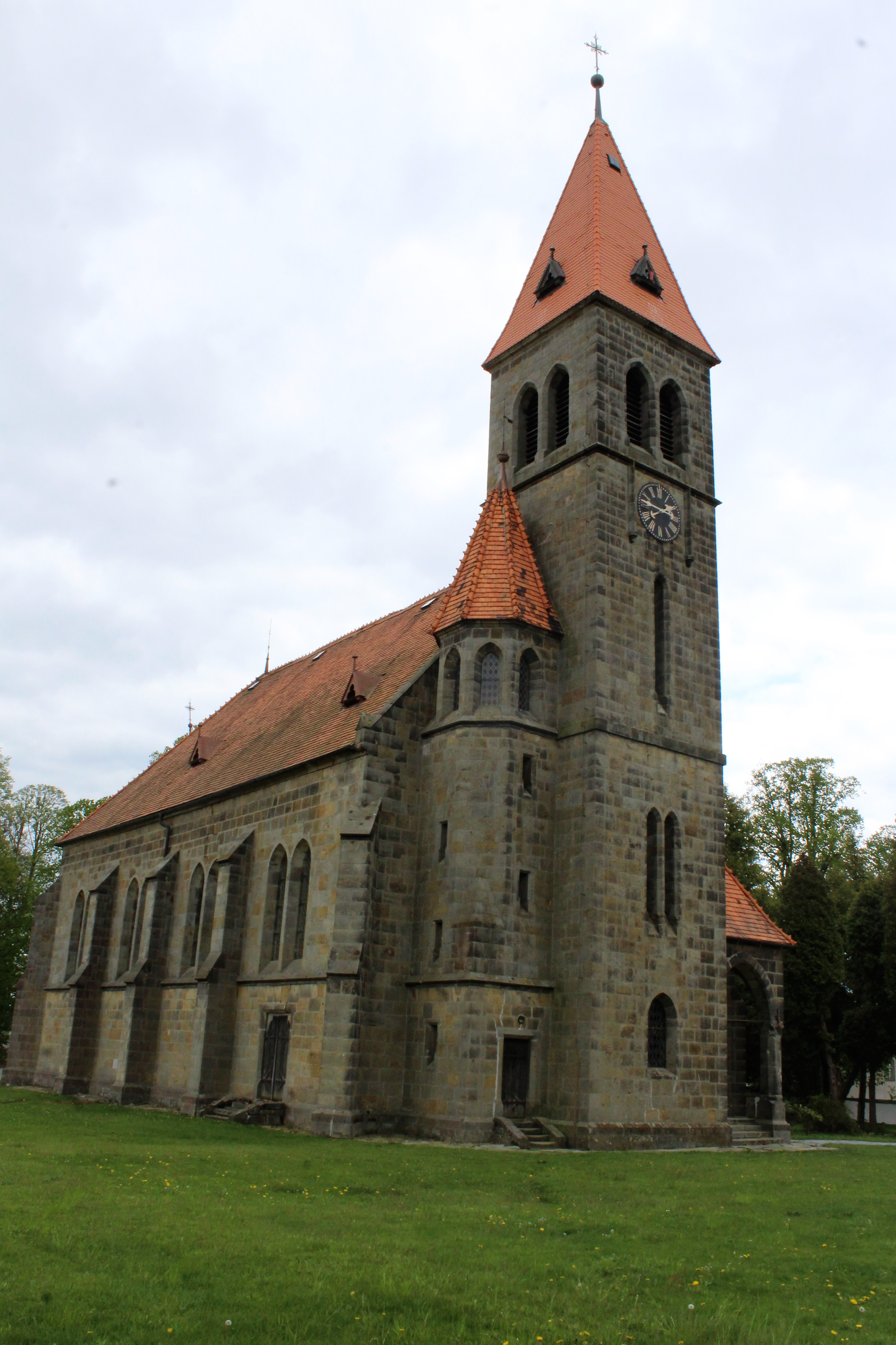 celý kostel